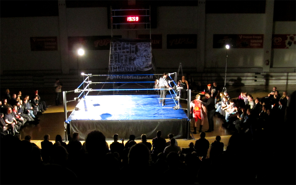 Valokuva FCF Talvisota tapahtumasta